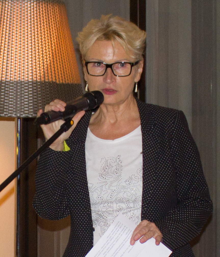 Dr. Renate Astrid Schimkoreit, Botschafterin der Bundesrepublik Deutschland in Senegal, Gambia, Guinea-Bissau und Cabo Verde mit Sitz in Dakar, Empfang der Delegationsreise Afrika Verein der deutschen Wirtschaft - Residenz des deutschen Botschafters in Dakar 23.11.2016 - Foto: Angelika Prox-Dampha